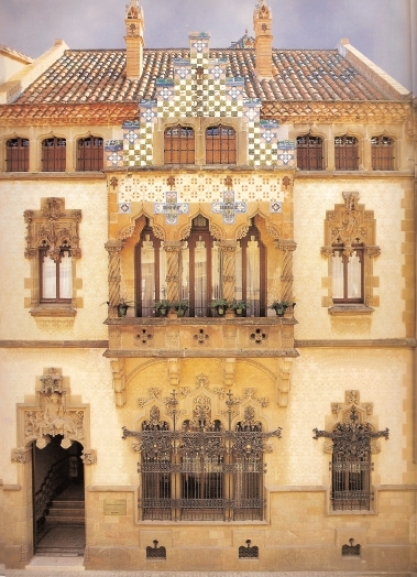 Façana de la Casa Coll i Regàs. Actual seu de la Fundació Caixa Laietana.